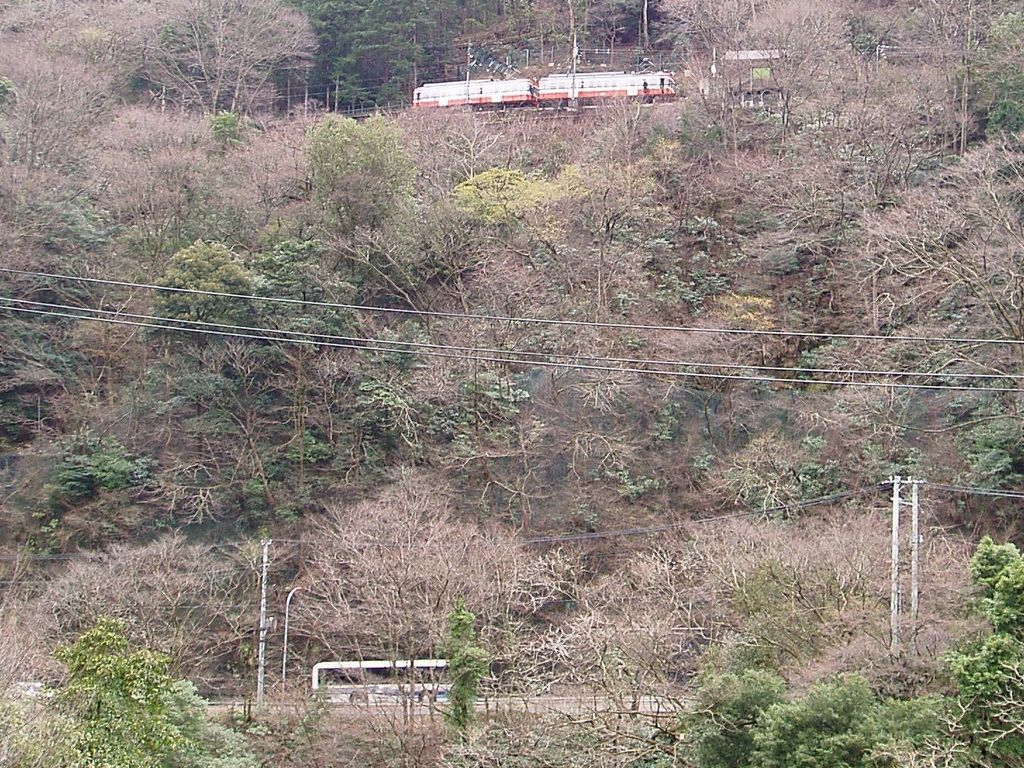 箱根登山鉄道 出山信号場 下の国道1号を走るバスと比較すれば、高低差が分かるかと。 2007.03.08 投稿者が撮影